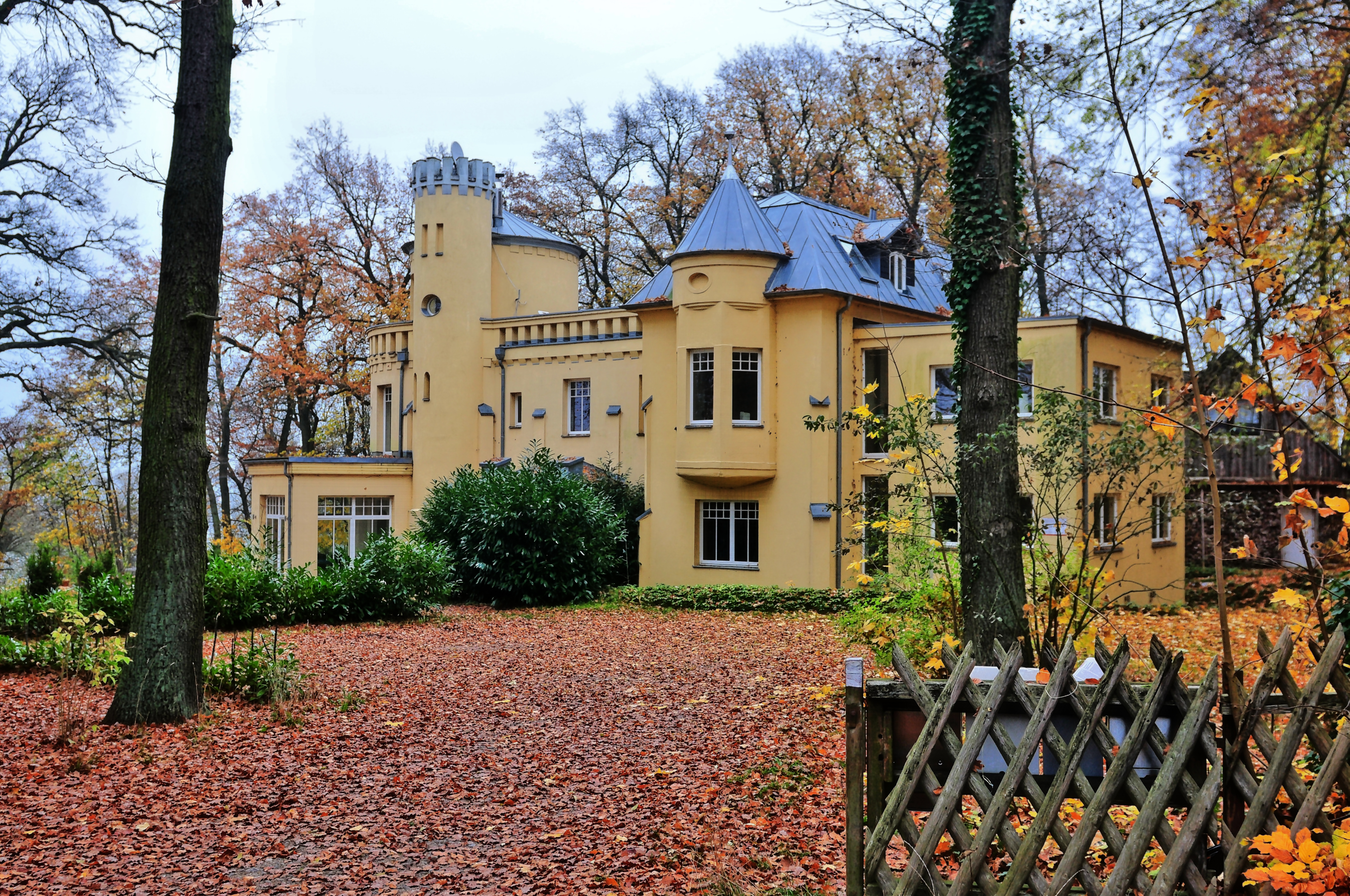 Schwerin